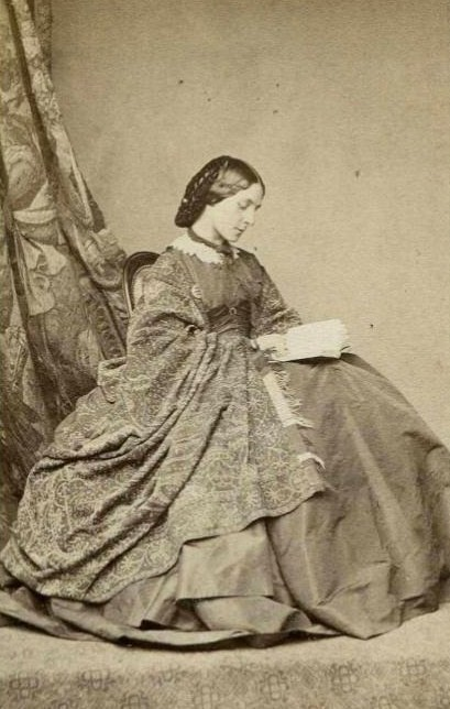 Графиня Софья Львовна Шувалова, ур. Нарышкина (1829—28.10.1894)